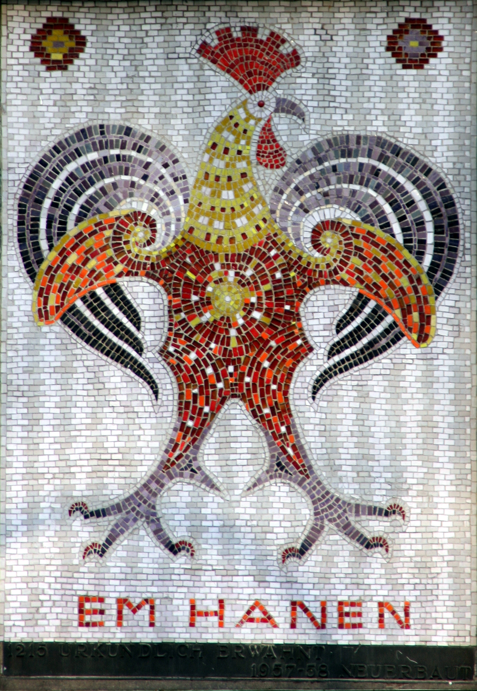 Mosaik am Wohn- und Geschäftshaus „Em Hanen“, Köln